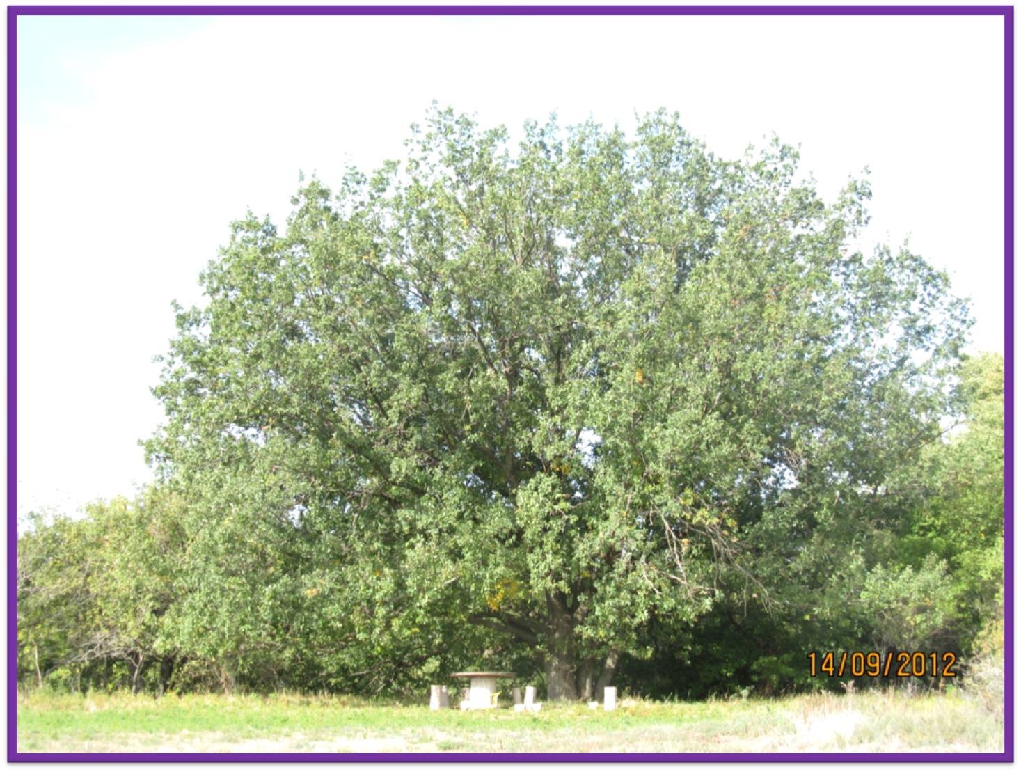 Dieser Baum - mit einem breiten abgerundeten Krone.